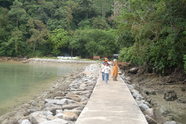 Pulau Dayang Bunting - pangkalan